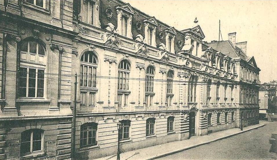 bibliothèque universitaire de Caen, rue Saint-Sauveur.